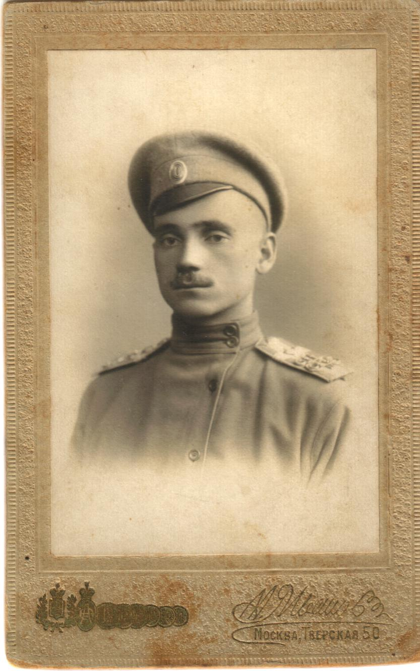 Леонтий Степанович Данилин, юнкер 1-й роты Алесандровского военного училища в Москве, ускоренный курс 1916 года, окончил обучение с отличием и правом выбора полка.